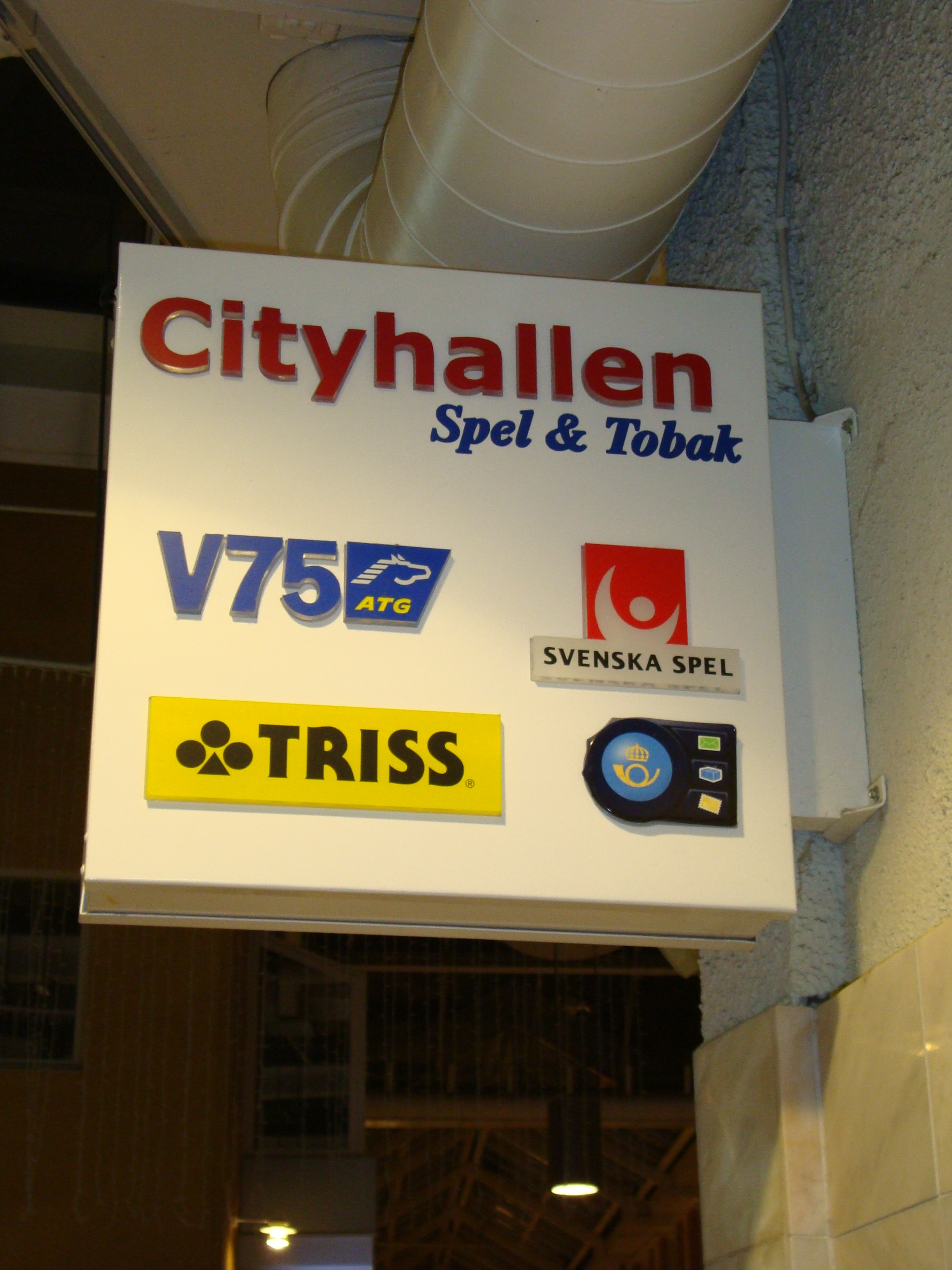 Cityhallen Spel & Tobak, Wachtmeister, Karlskrona